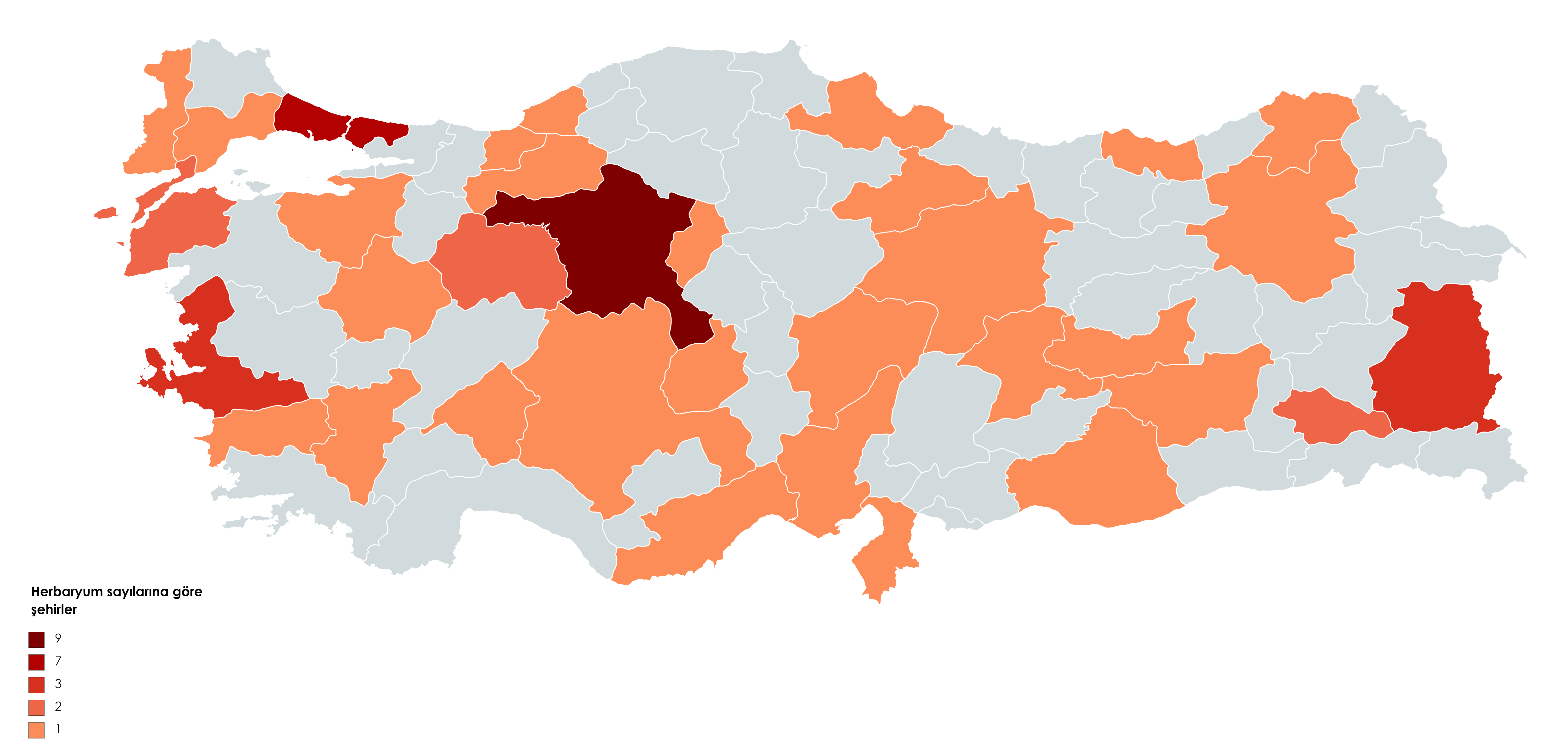 Türkiye'deki herbaryumlar